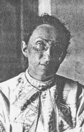 Баронеса Віра Штайнгайль.